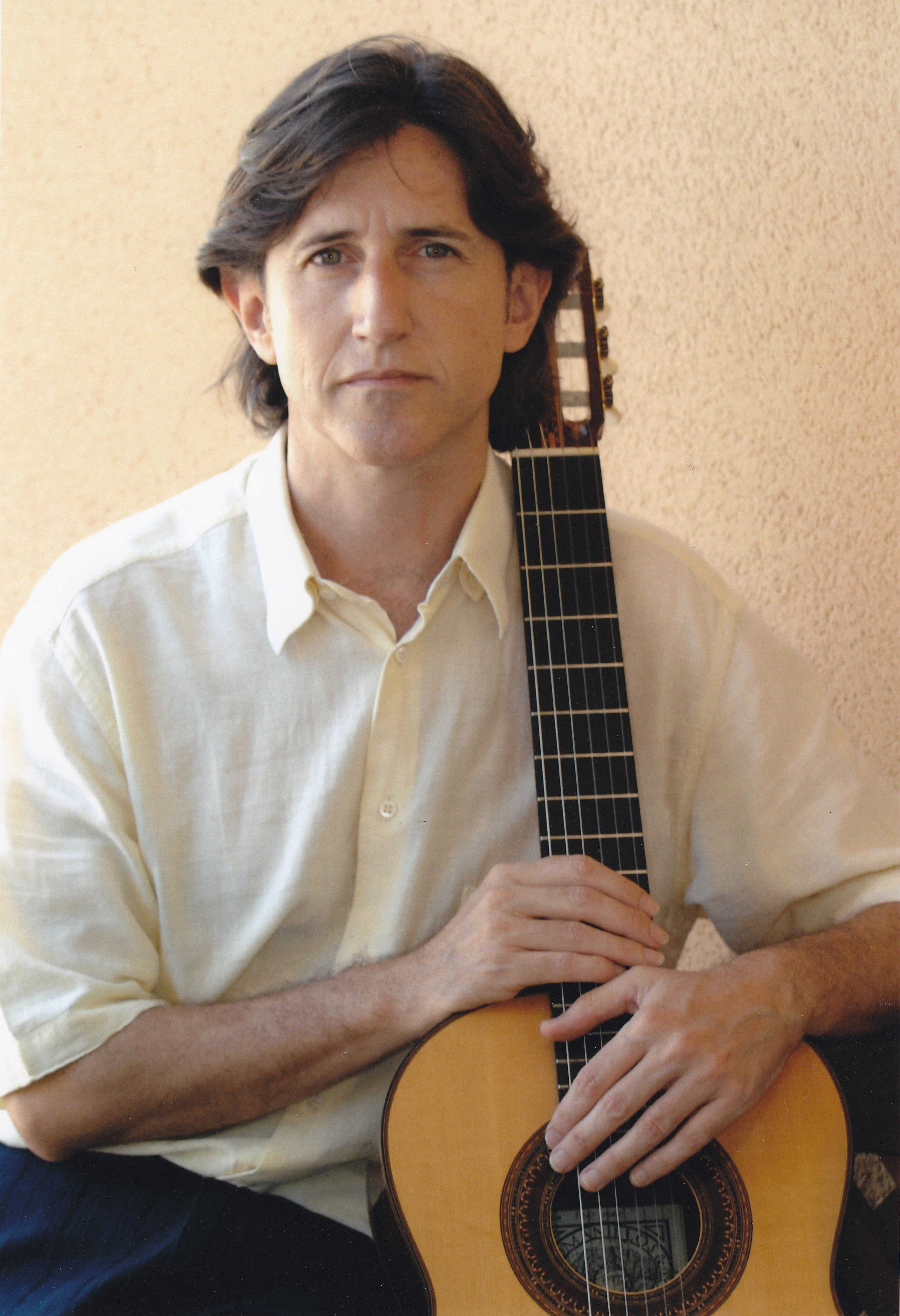 Ignacio Rodes guitarrista clásico español con su guitarra José L. Romanillos llamada "La por qué"